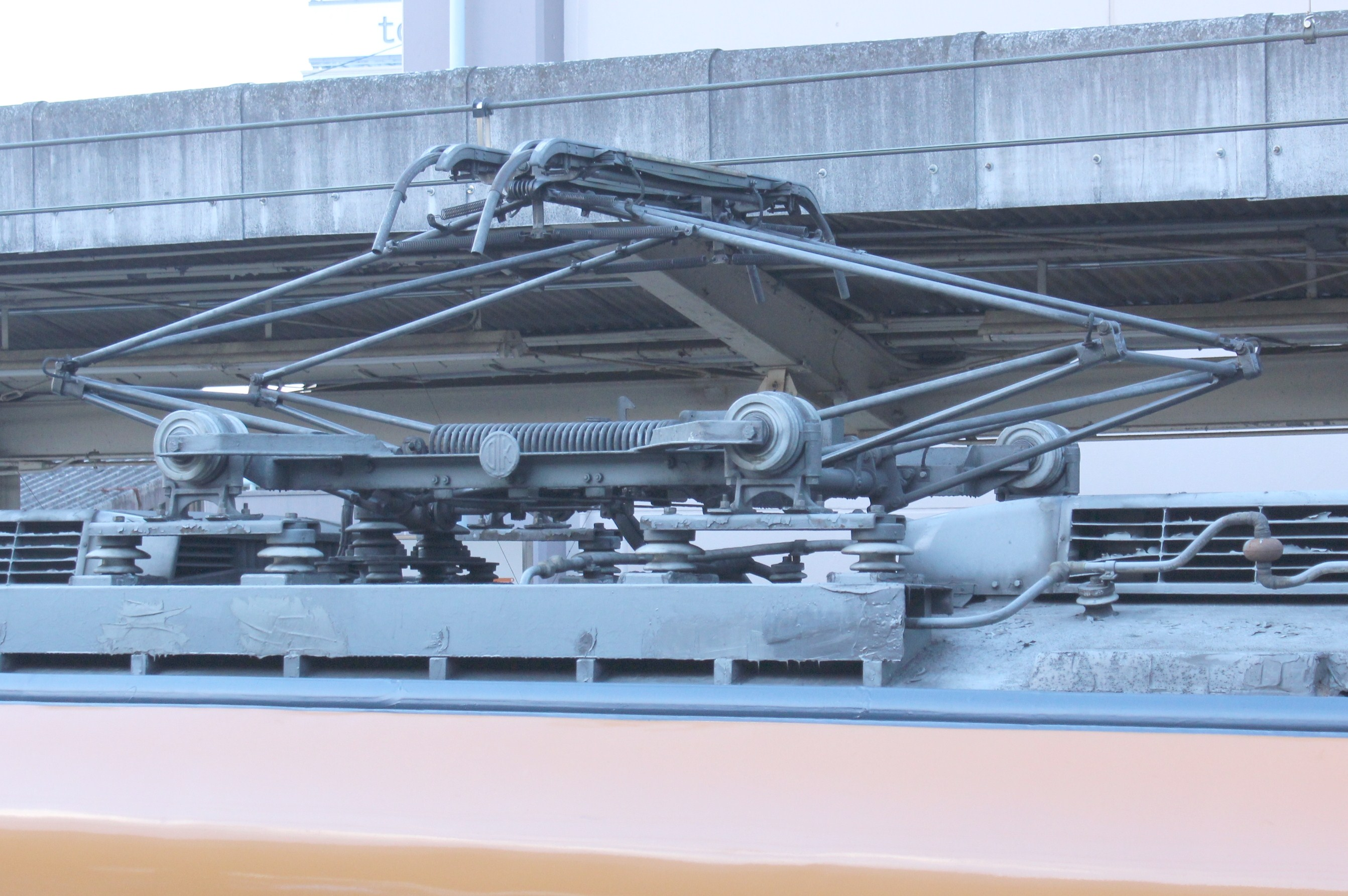 近鉄12200系パンタグラフ PT-42